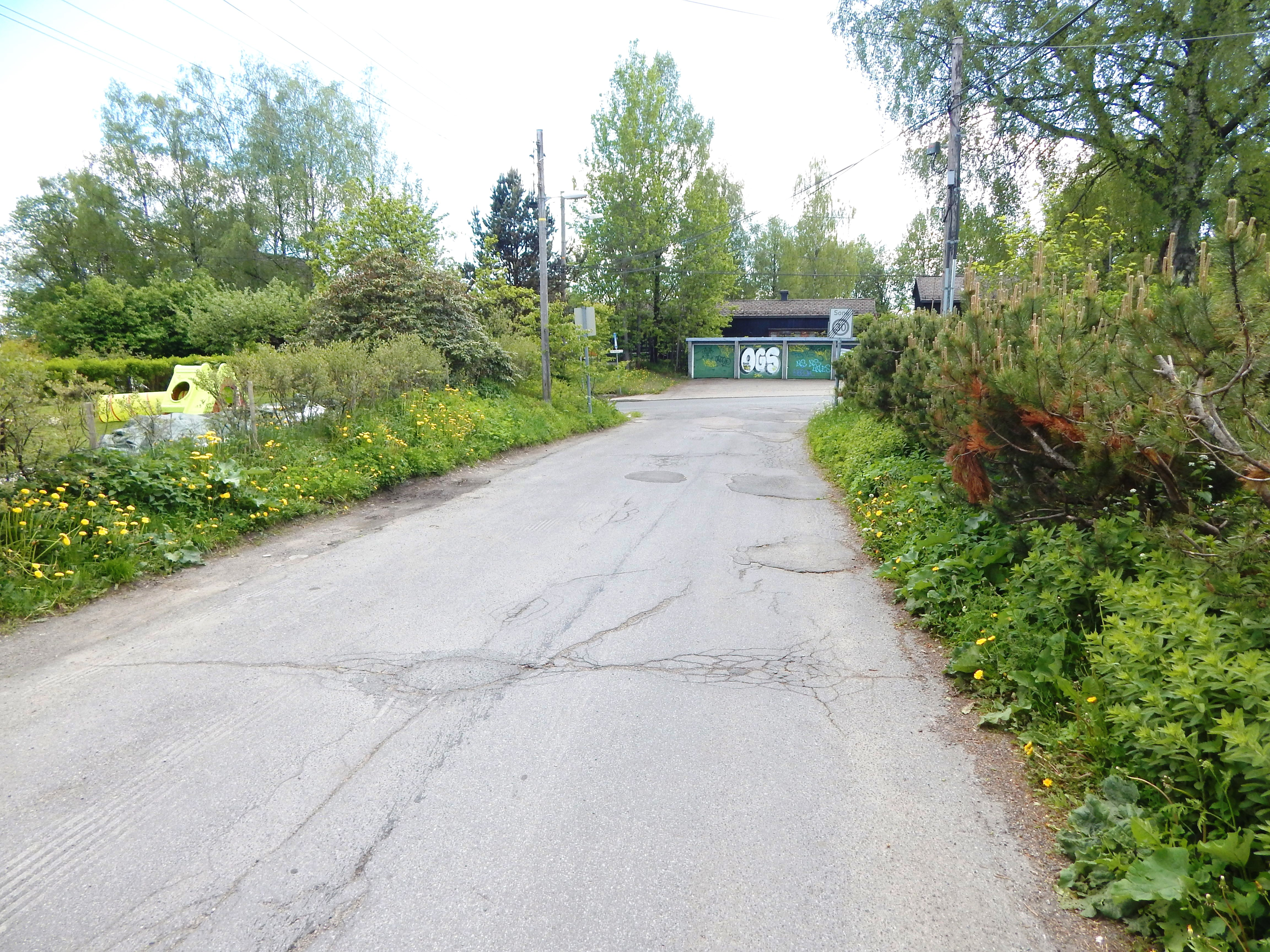 Korsvollbråtan mot Carl Kjelsens vei